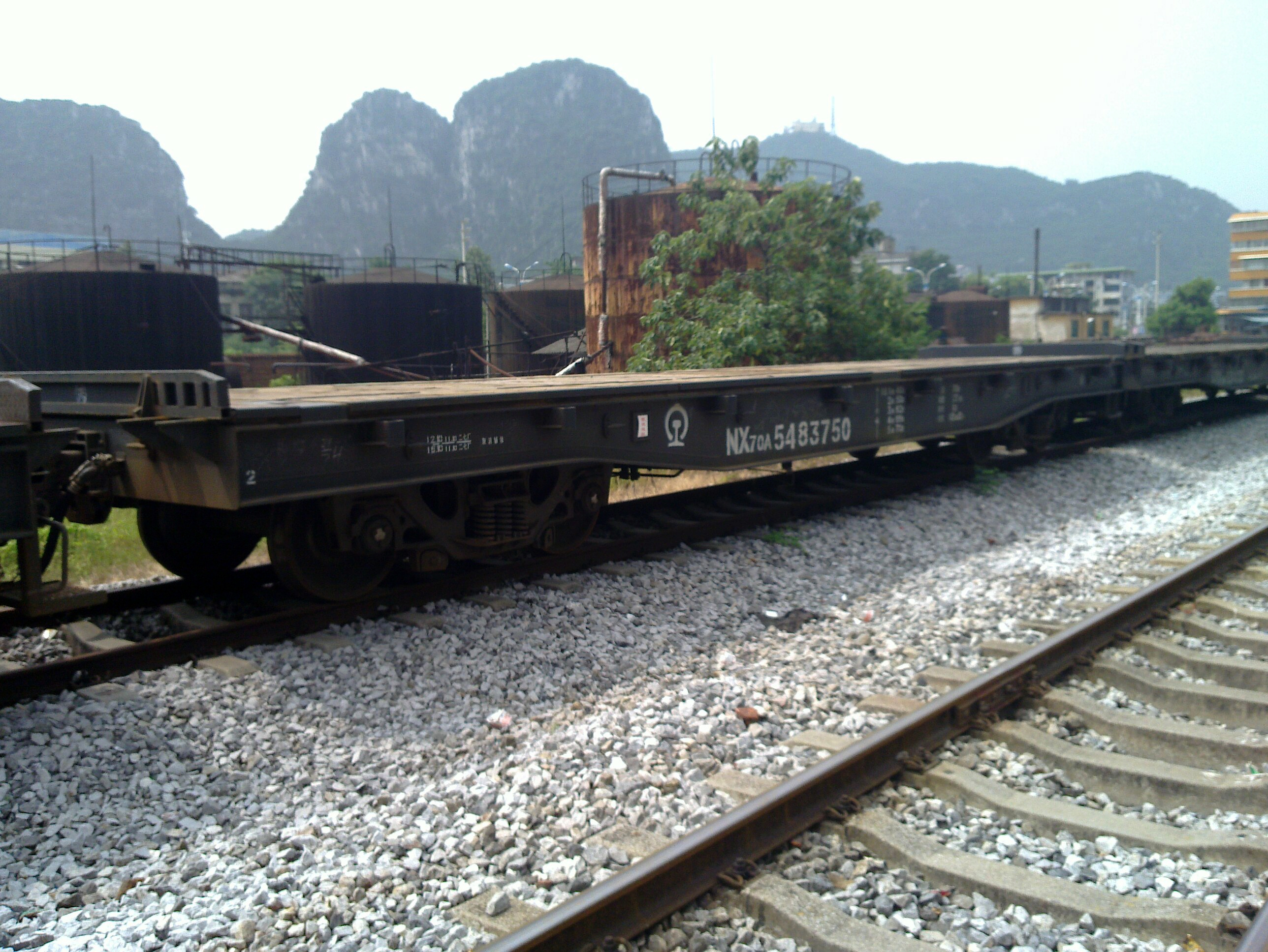 一节NX70A平车停放在桂林南站，该款平车采用了F型车钩（在中国称之为17型车钩）